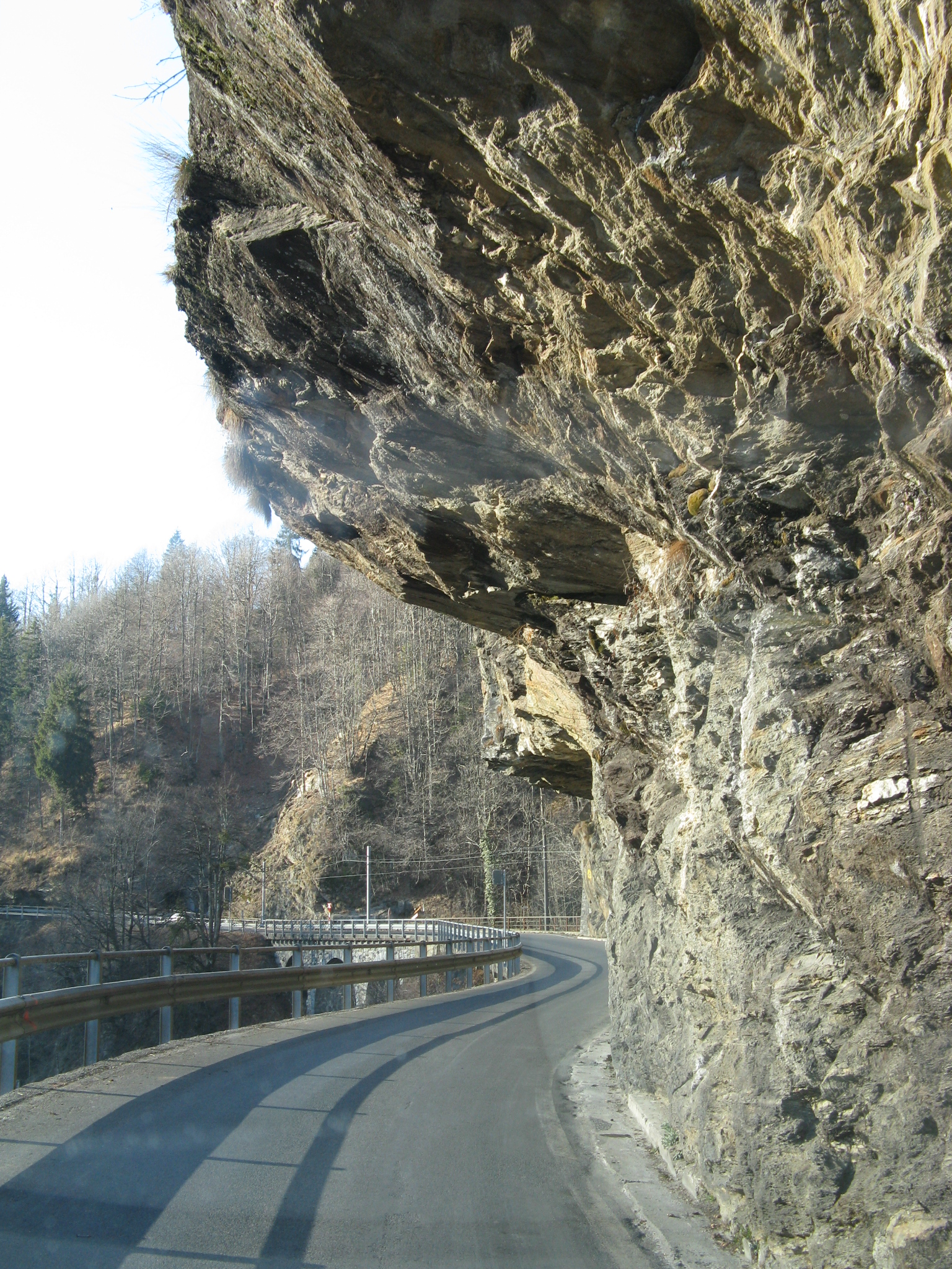 Centovalli (Switzerland), road